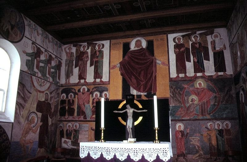 Sindal Bykirke i Danmark. Kor østvæg The paintings are the work of Elof Risebye (1921).